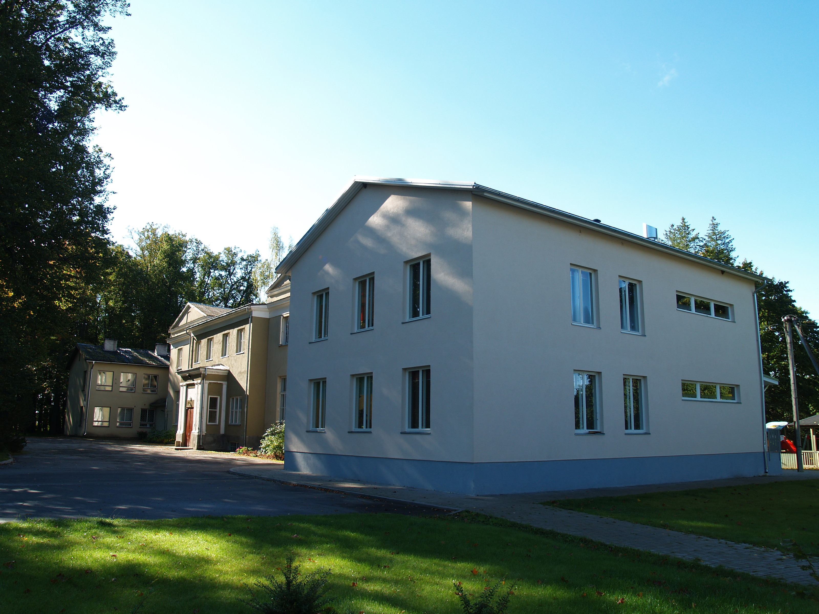 Kuuste Kool